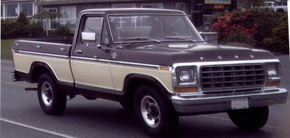 F-Series 1979